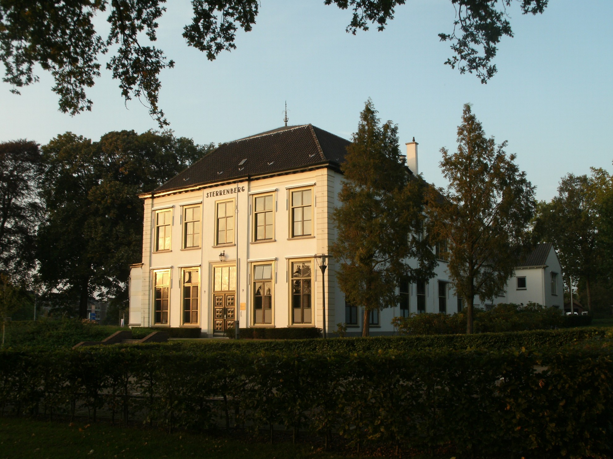 Villa Sterrenberg. Voormalig gemeentehuis van Ede